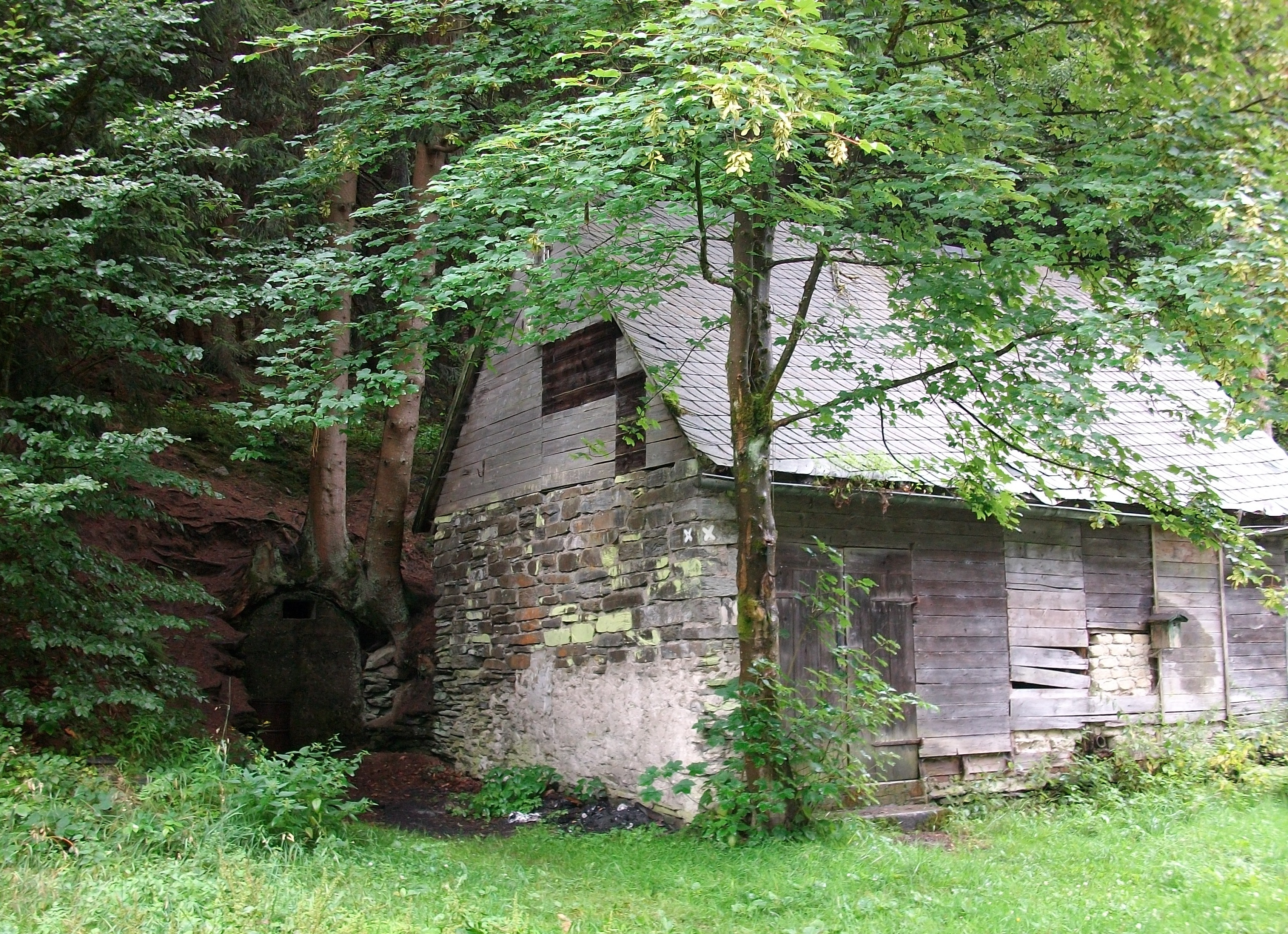 Schmallenberg-Lengenbeck, zugemauerter Stolleneingang, Schiefergrube Sperlingslust (Germany)